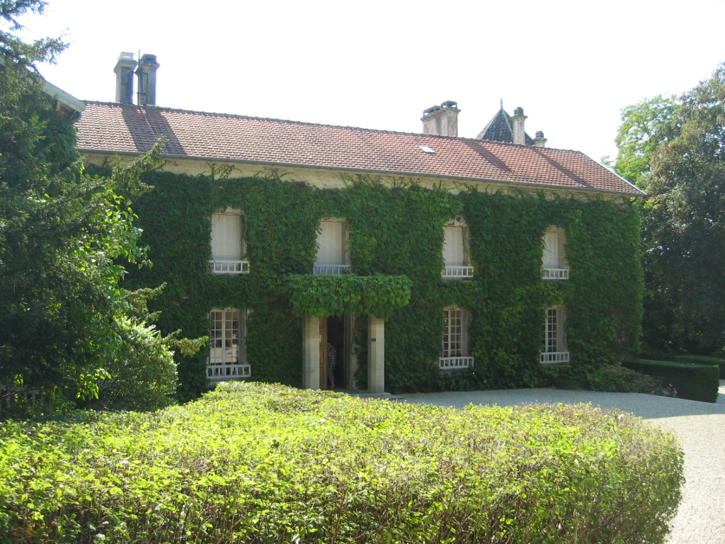 La Boisserie - Résidence du général de Gaulle à Colombey-les-Deux-Églises